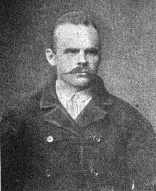 Österreichischer Politiker, Reichsratswahl 1907, Name siehe Dateiname